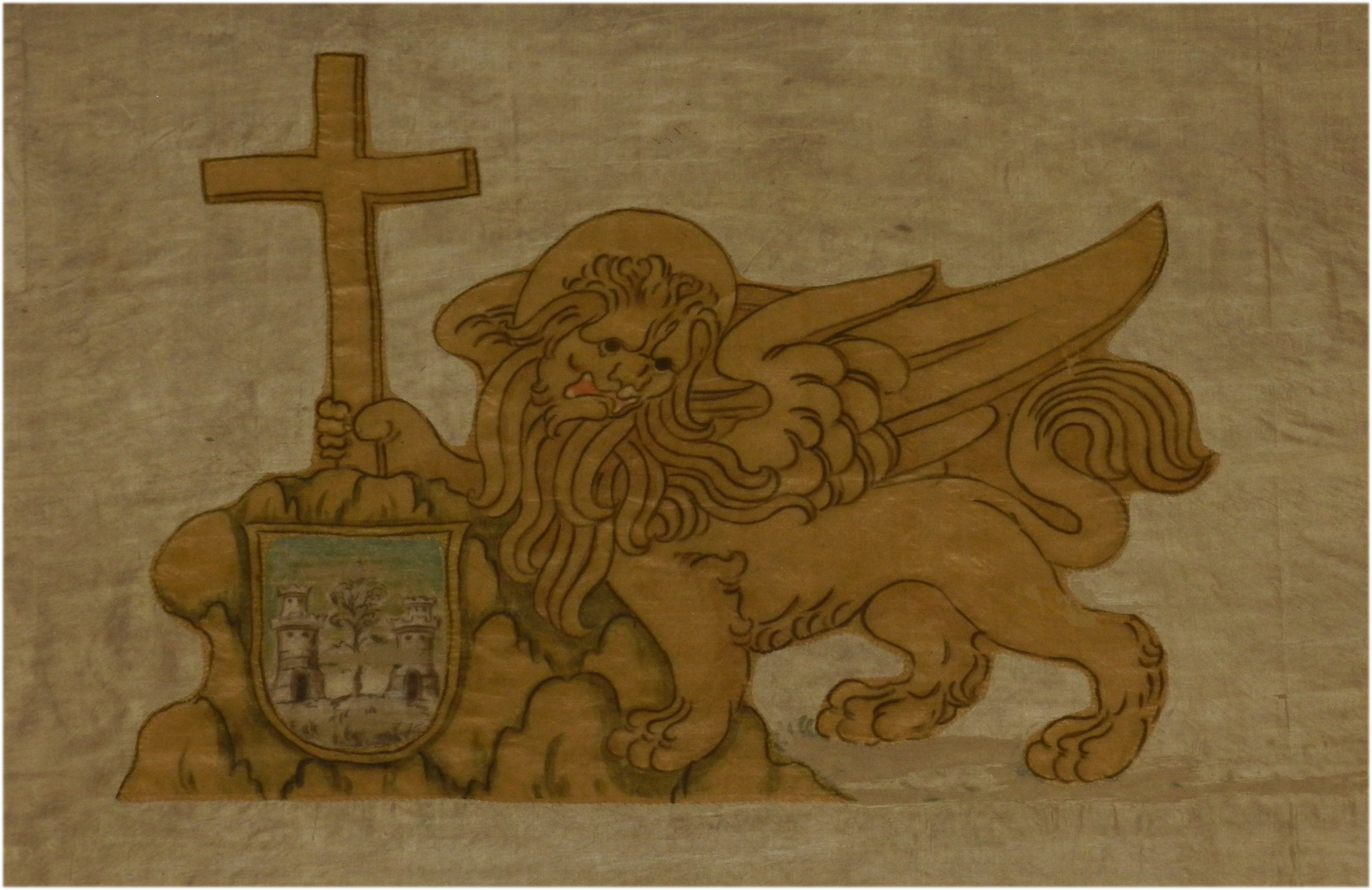 Particolare bandiera Centenaro Venas